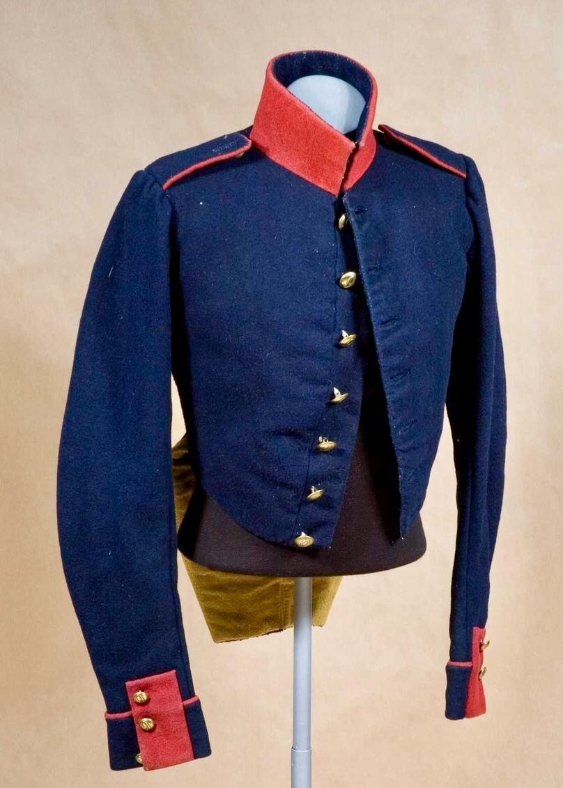 Tillhör Armémuseums samlingar.